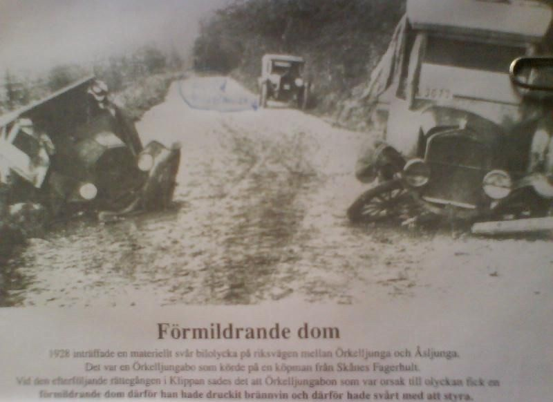 Klassisk krock utanför Åsljunga. Bildtexten lyder som följer: 1928 inträffade en materiellt svår bilolycka på riksvägen mellan Örkelljunga och Åsljunga. Det var en Örkelljungabo som körde på en köpman från Skånes Fagerhult. Vid den efterföljande rättegången i Klippan sades det att Örkelljungabon som var orsak till olyckan fick en förmildrande dom därför han hade druckit brännvin och därför hade svårt med att styra.